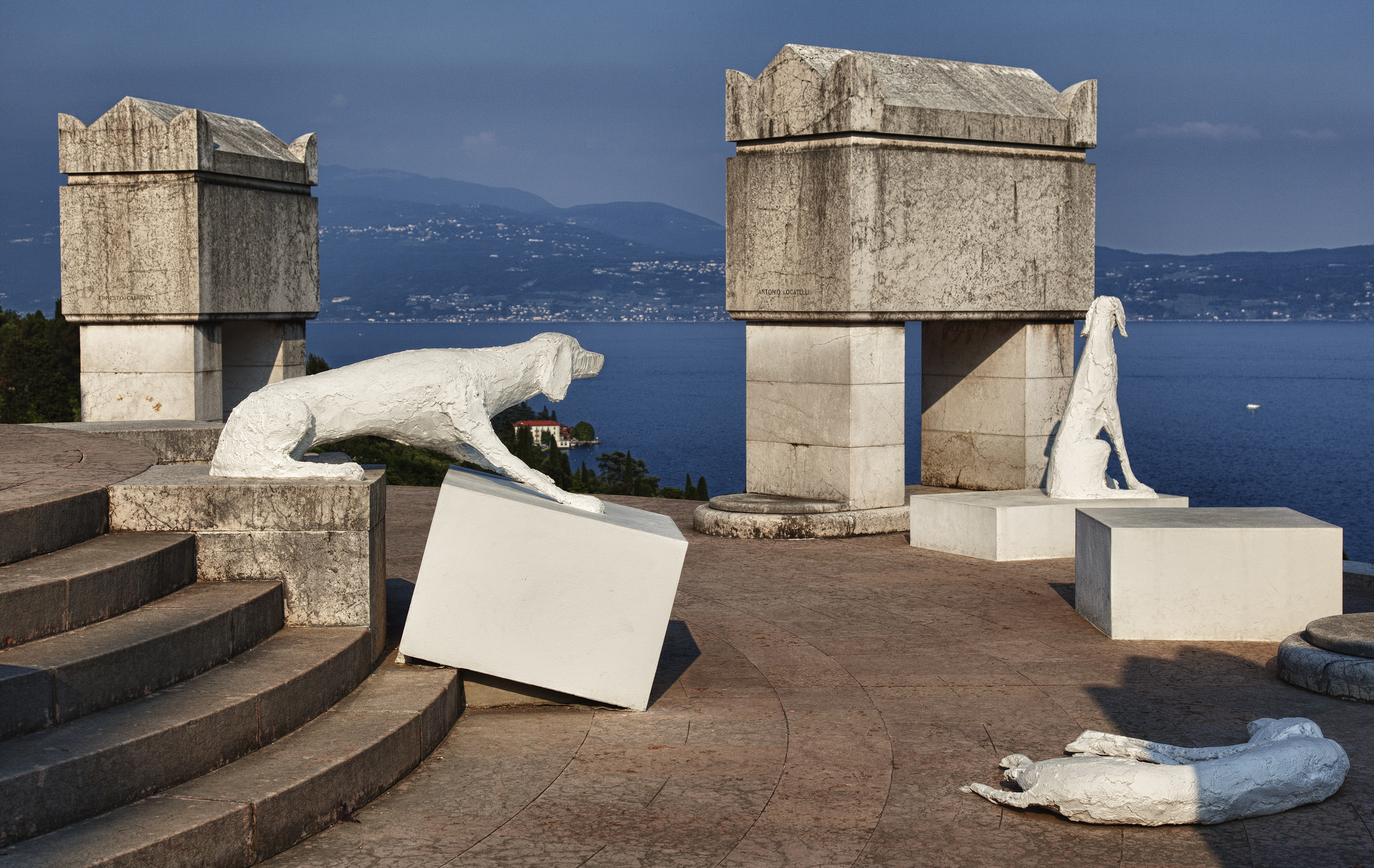 mausoleo e tomba di Gabriele d'Annunzio (Vittoriale degli italiani) This is a photo of a monument which is part of cultural heritage of Italy.